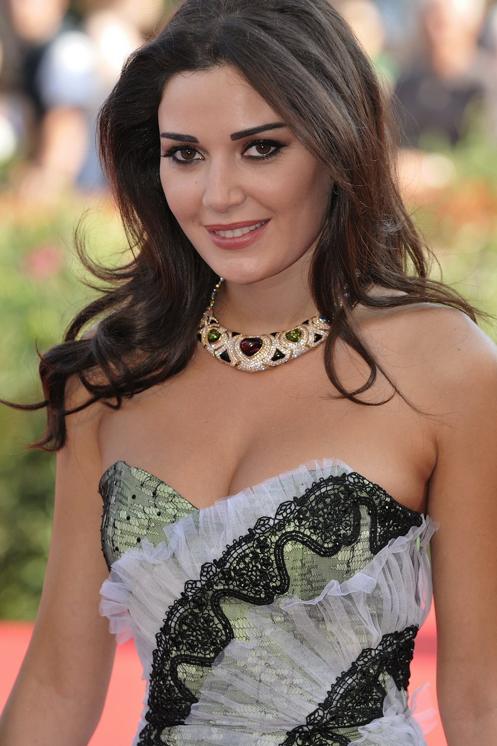 66ème Festival du Cinéma de Venise (Mostra), 9ème jour (10/09/2009) Tapis rouge avec Omar Sharif et Cyrine AbdelNour pour le film The Traveller de Ahmed Maher